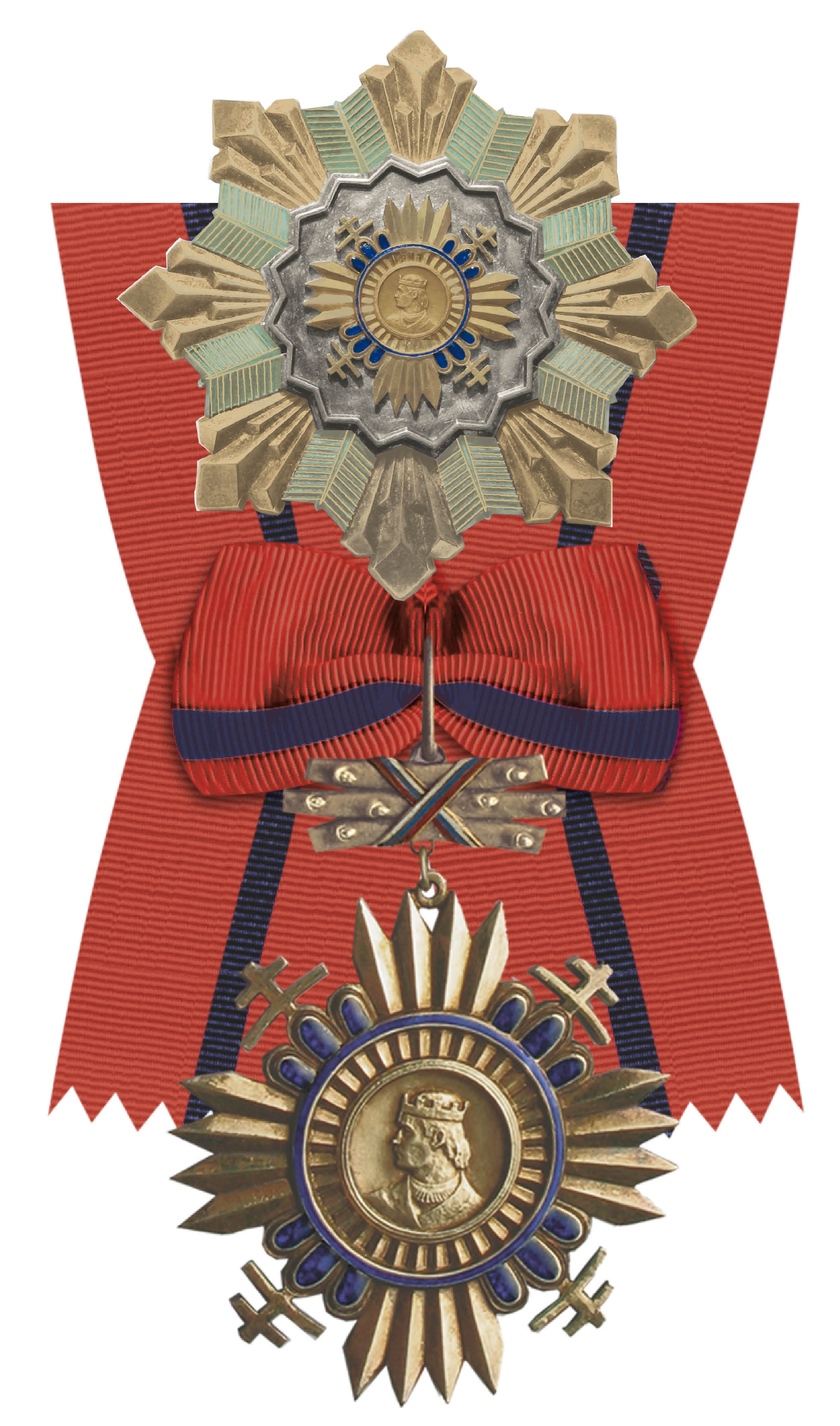 Veľkoríž Radu kniežaťa Pribinu s časťou radovej stuhy a hviezdou 1. triedy vojnovej Slovenskej republiky 1940-45. Autorom je sochár Ladislav Majerský